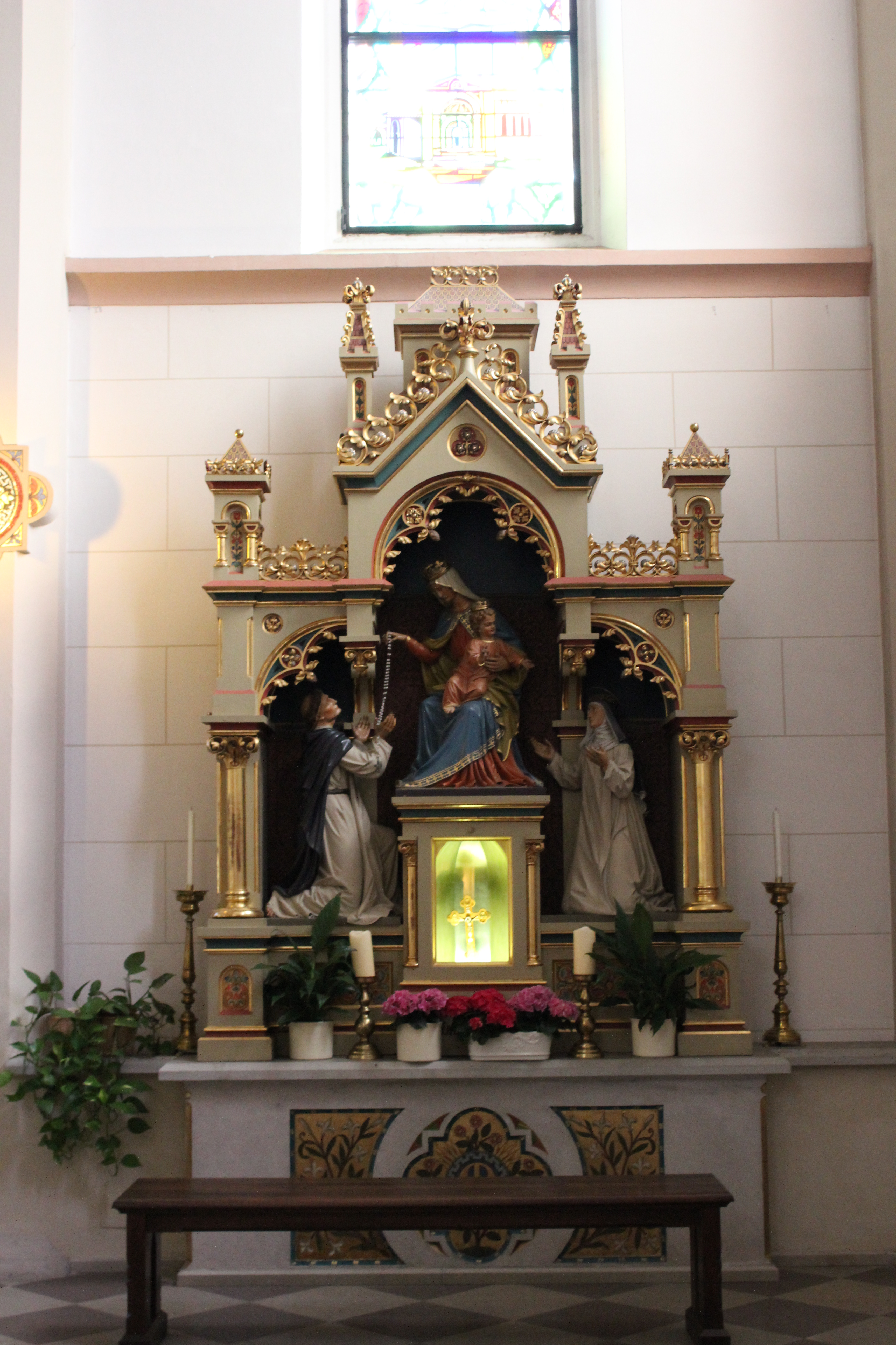 Dominikanerkirche St. Josef in Eppan - Rechtes Kirchenschiff